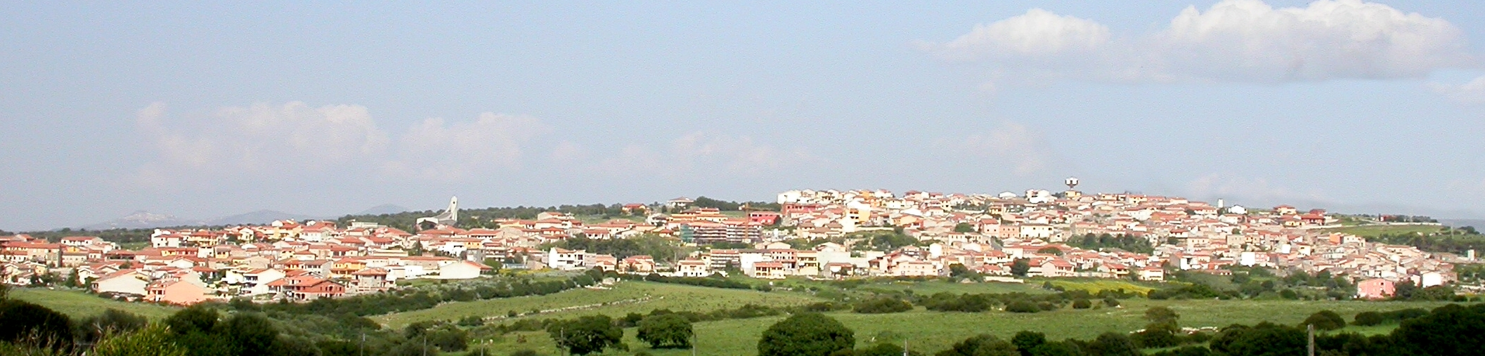 Panorama di Uri, visto dalla strada per Alghero.